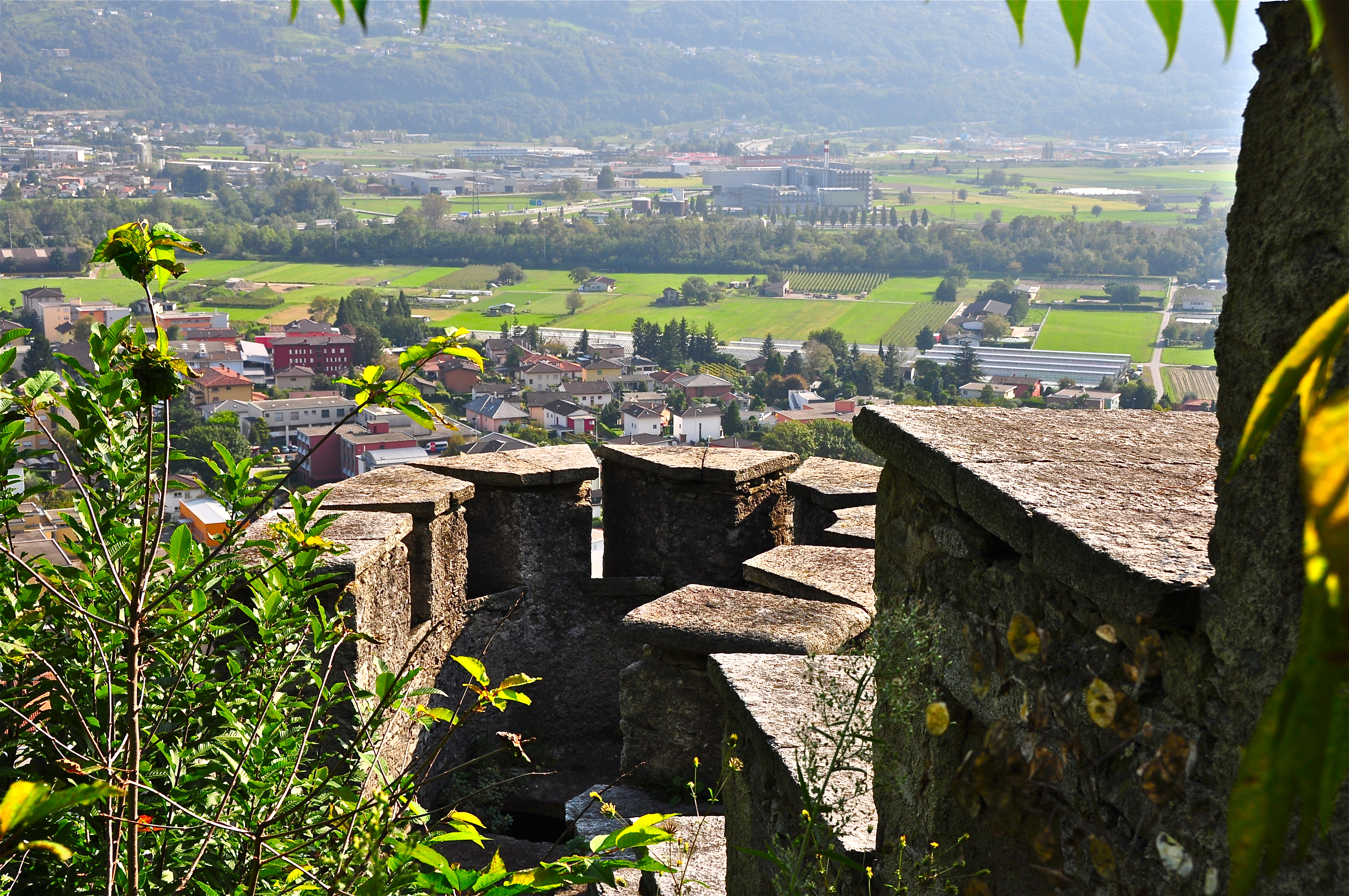 Vista della murata e torre di osservazione.